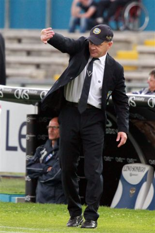 Giuseppe Iachini, mister del Brescia.